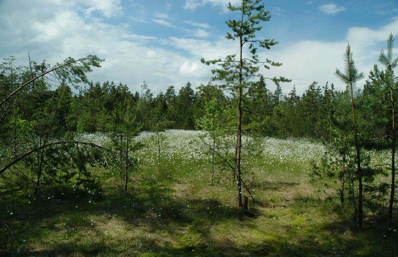 Červené blato – pohled do bývalého těžebního pole